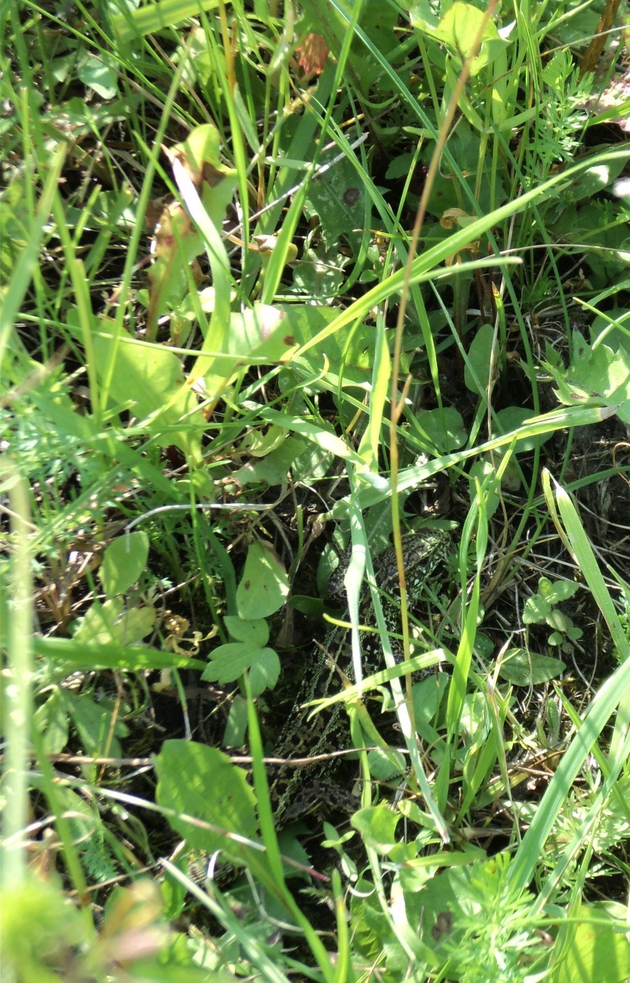 Lacerta agilis